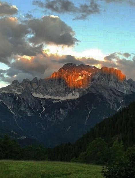 Civetta - Cime di San Sebastiano (Q49963043)